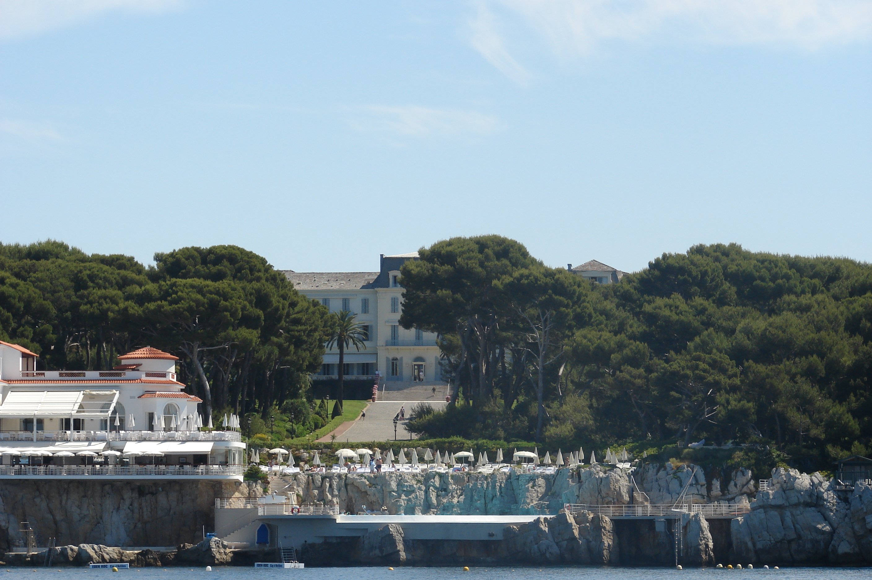 Cap d´ Antibes